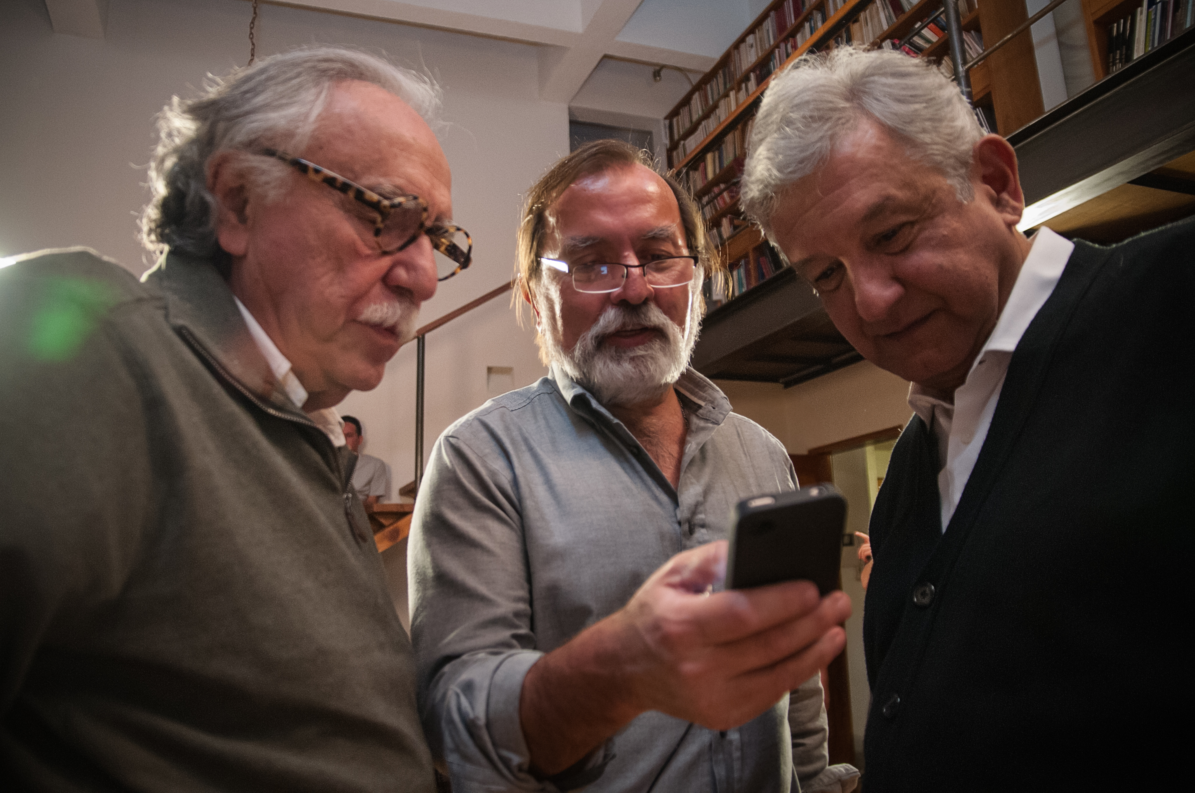 El fundador de "La Jornada", el productor y el político se juntaron para charlar. En la imagen, Epigmenio Ibarra le enseña a Payán y Obrador uno de los cientos de tuits que la gente le lanzó al político con el HT #AMLOenRevolución.